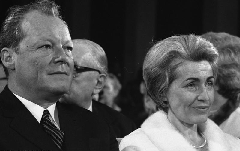 Verleihung des Theodor-Heuss-Preises an Oberstaatsanwältin Barbara Just-Dahlmann und an die Lebenshilfe für geistig Behinderte e.V. Bürgeraktion zum Schutze der Demokratie e.V. München